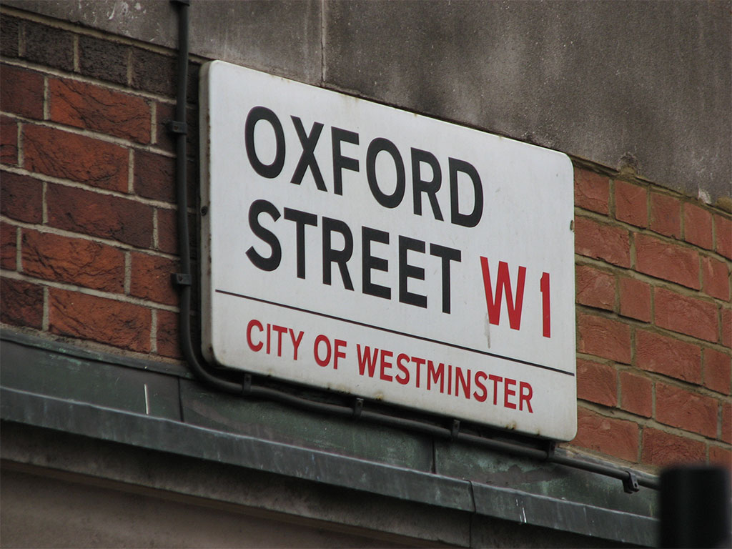 Street Sign, Oxford Street